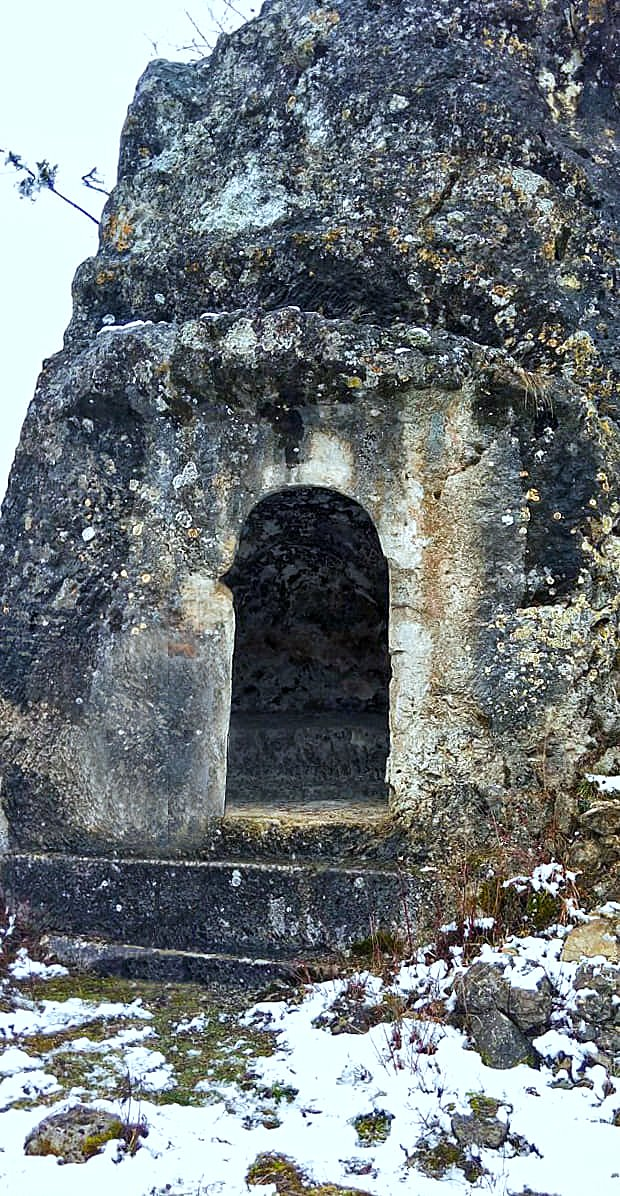 Kripta u selu Rataji kod Miljevine (Foča) - ulaz.